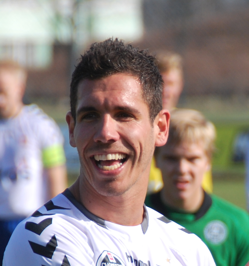 Fodboldspilleren Jonathan Neftali fra Vejle Boldklub Kolding. Her i en testkamp mod Viborg FF på VFFs træningsanlæg på Kirkebækvej i Viborg.